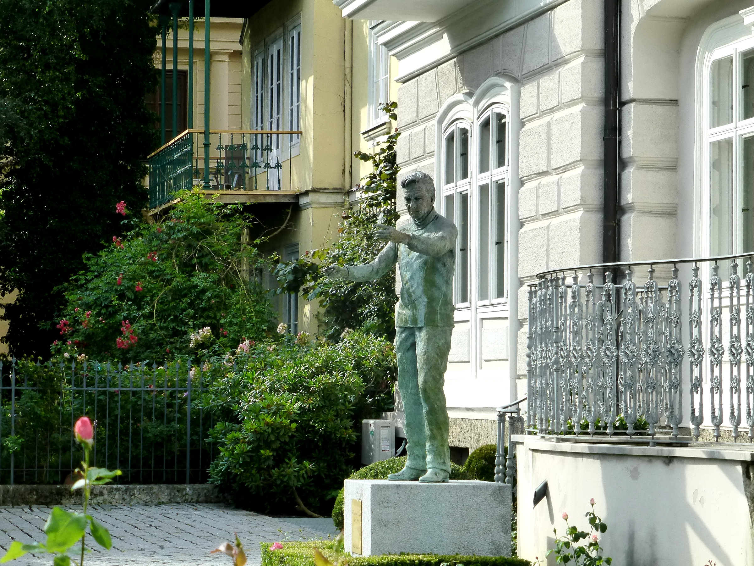 Karajan Statue Karajan Geburtshaus Salzburg Austria